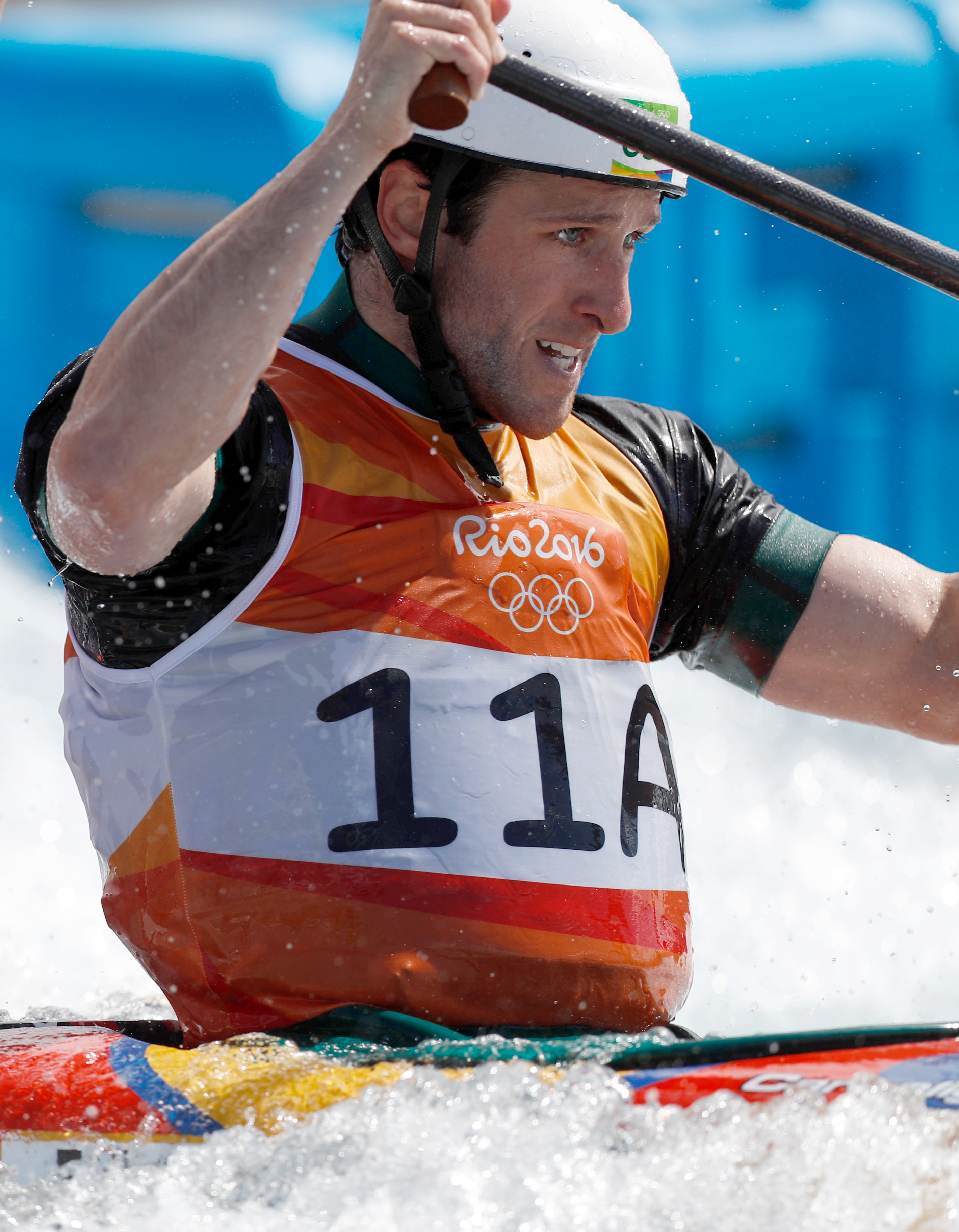 Rio de Janeiro - Norte-americanos Devin McEwan e Casey Eichfeld disputam canoagem slalom categoria C2 nos Jogos Olímpicos Rio 2016 no X Park em Deodoro (Fernando Frazão/Agência Brasil)